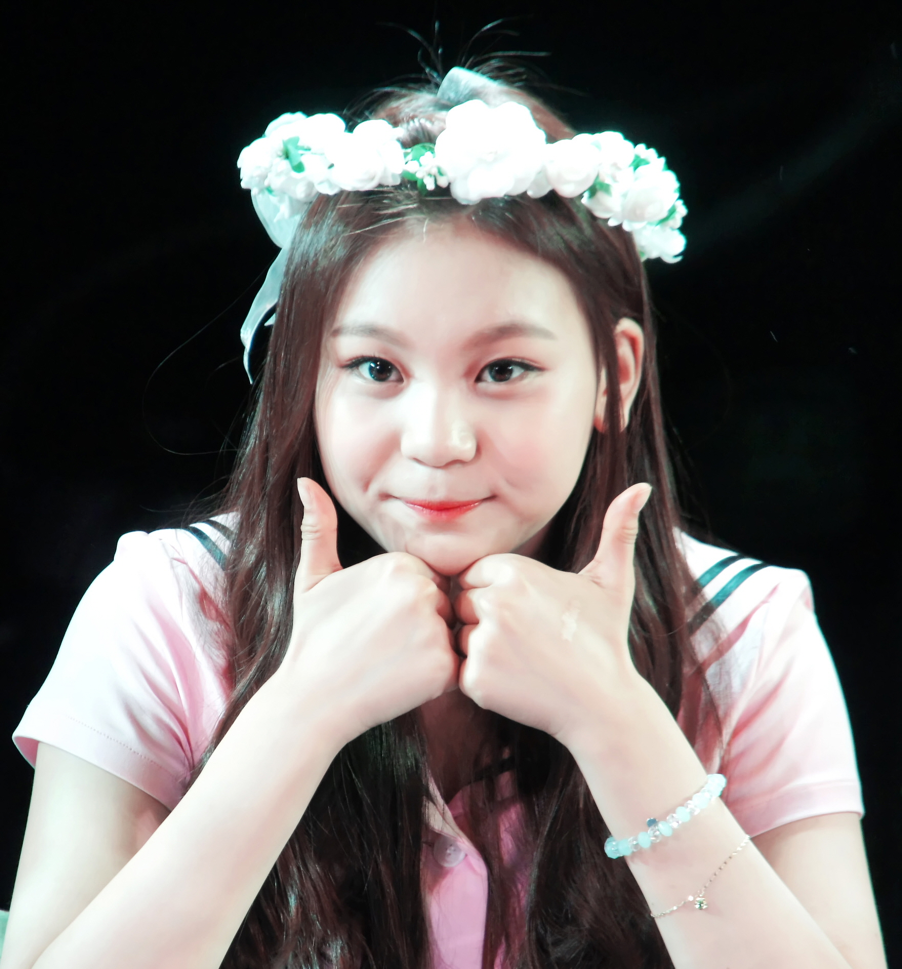 150823 홍대 팬사인회 엄지